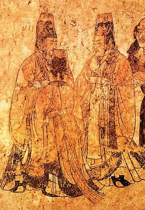 中文（香港）: 章懷太子墓壁畫禮賓圖